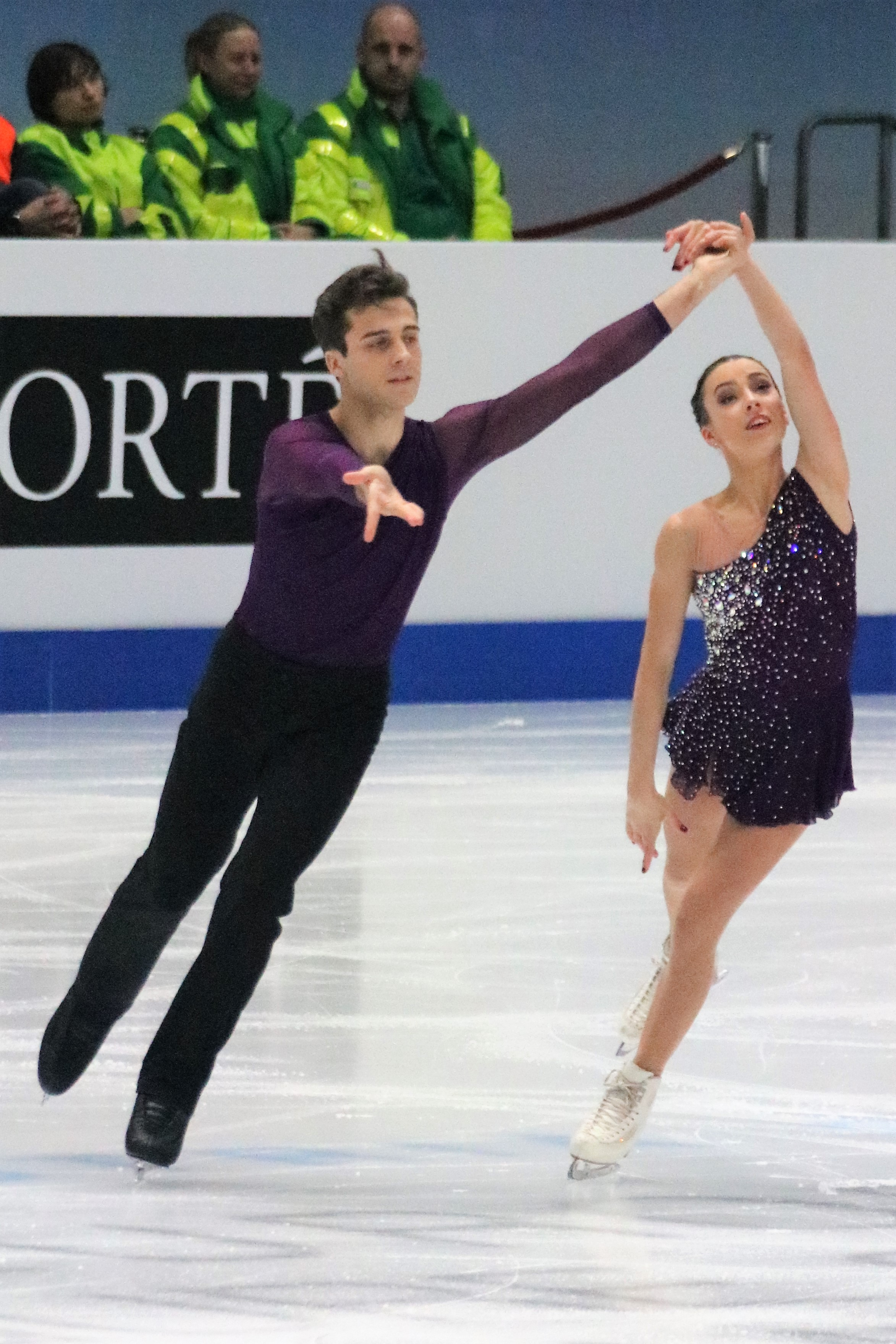 Лаура Баркеро / Тон Консул (Испания) на чемпионате Европы по фигурному катанию 2020